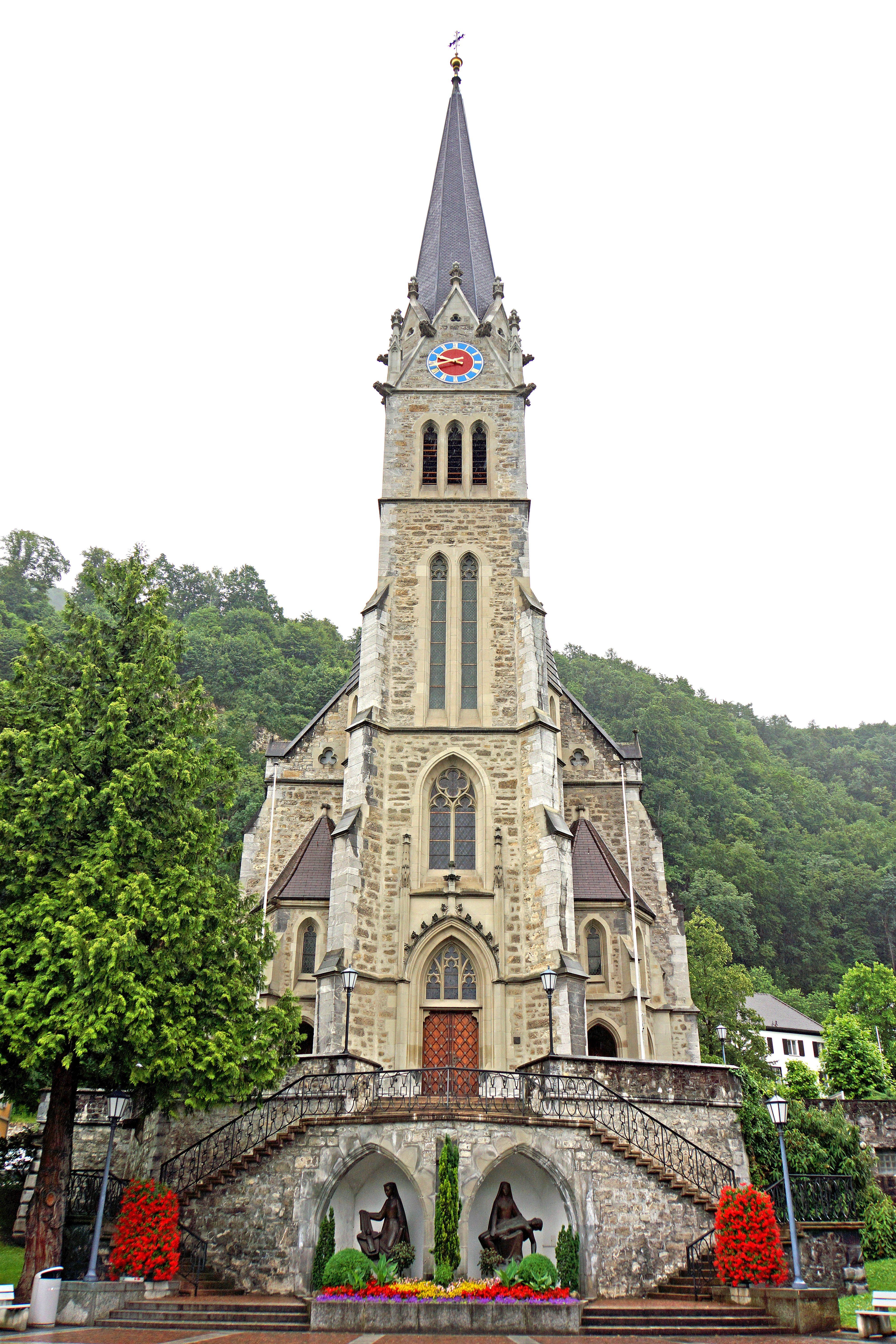 Kathedrale St. Florin, Vaduz; Mit Skulpturen Geburt und Tod Jesu, Künstler: Hans von Matt.